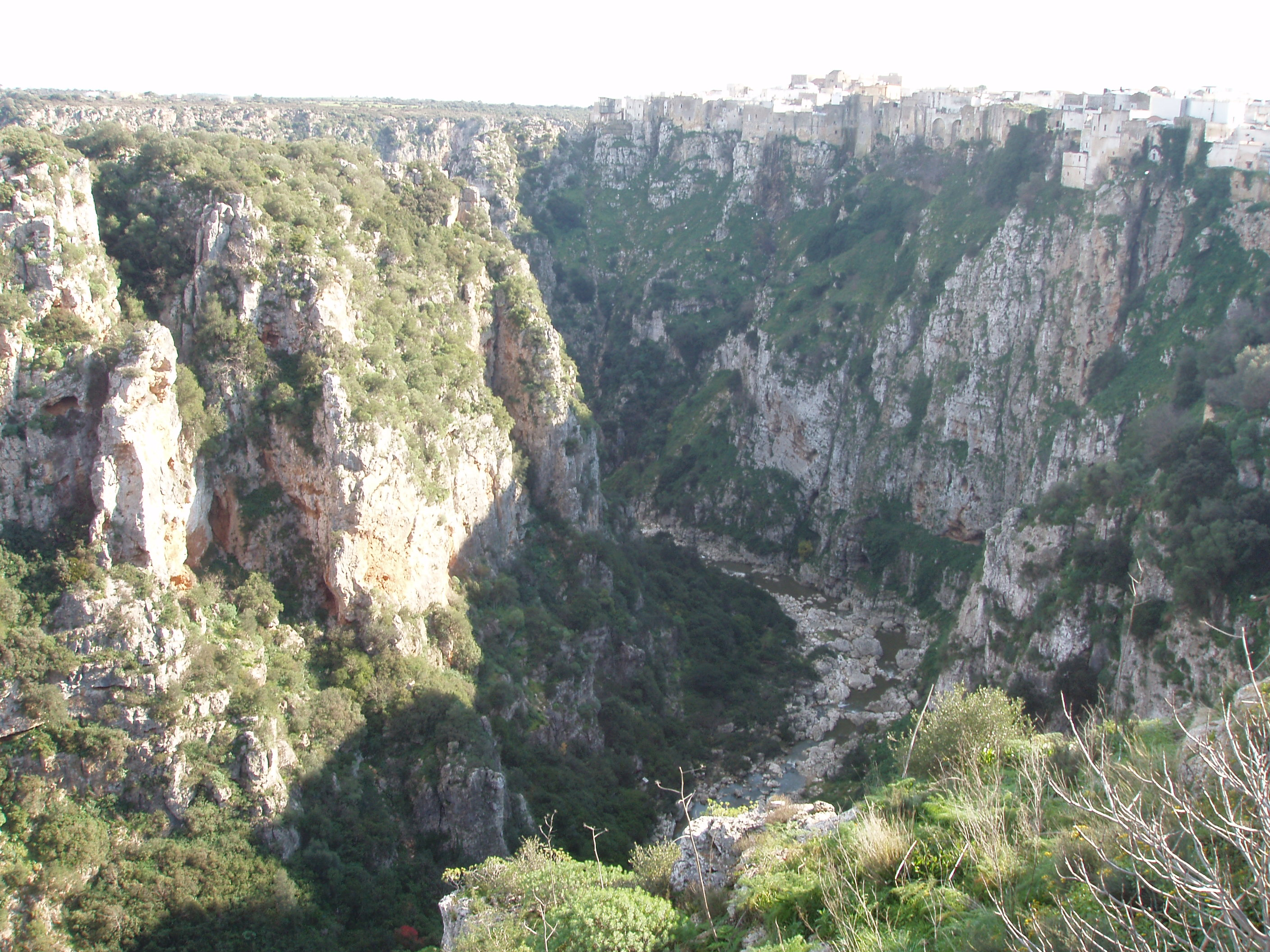 Castellaneta - Borgo antico a strapiombo sulla Gravina Grande